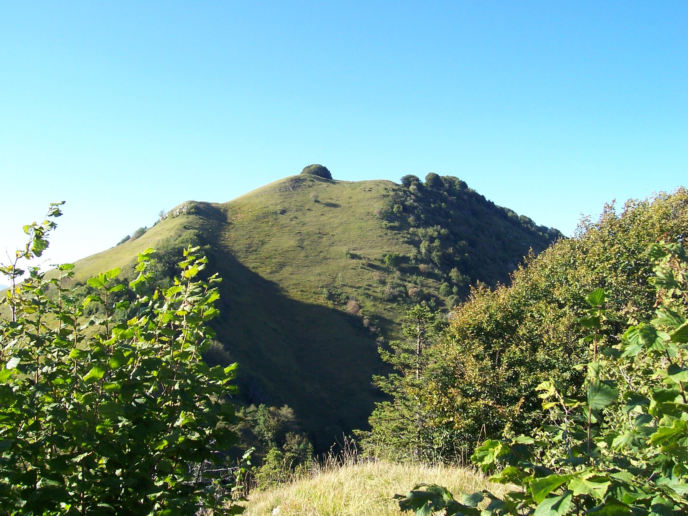 monte Carzen in Val Vestino